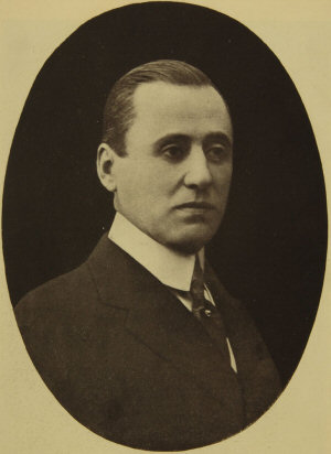 L'attore e regista del cinema muto Vittorio Rossi Pianelli (1875-1953).